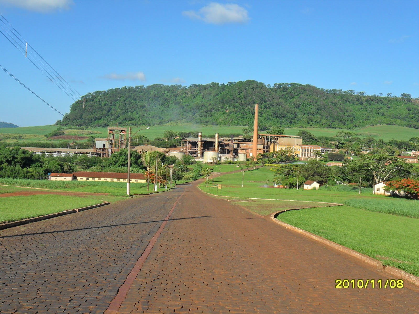 Vista área da Usina Mendonça